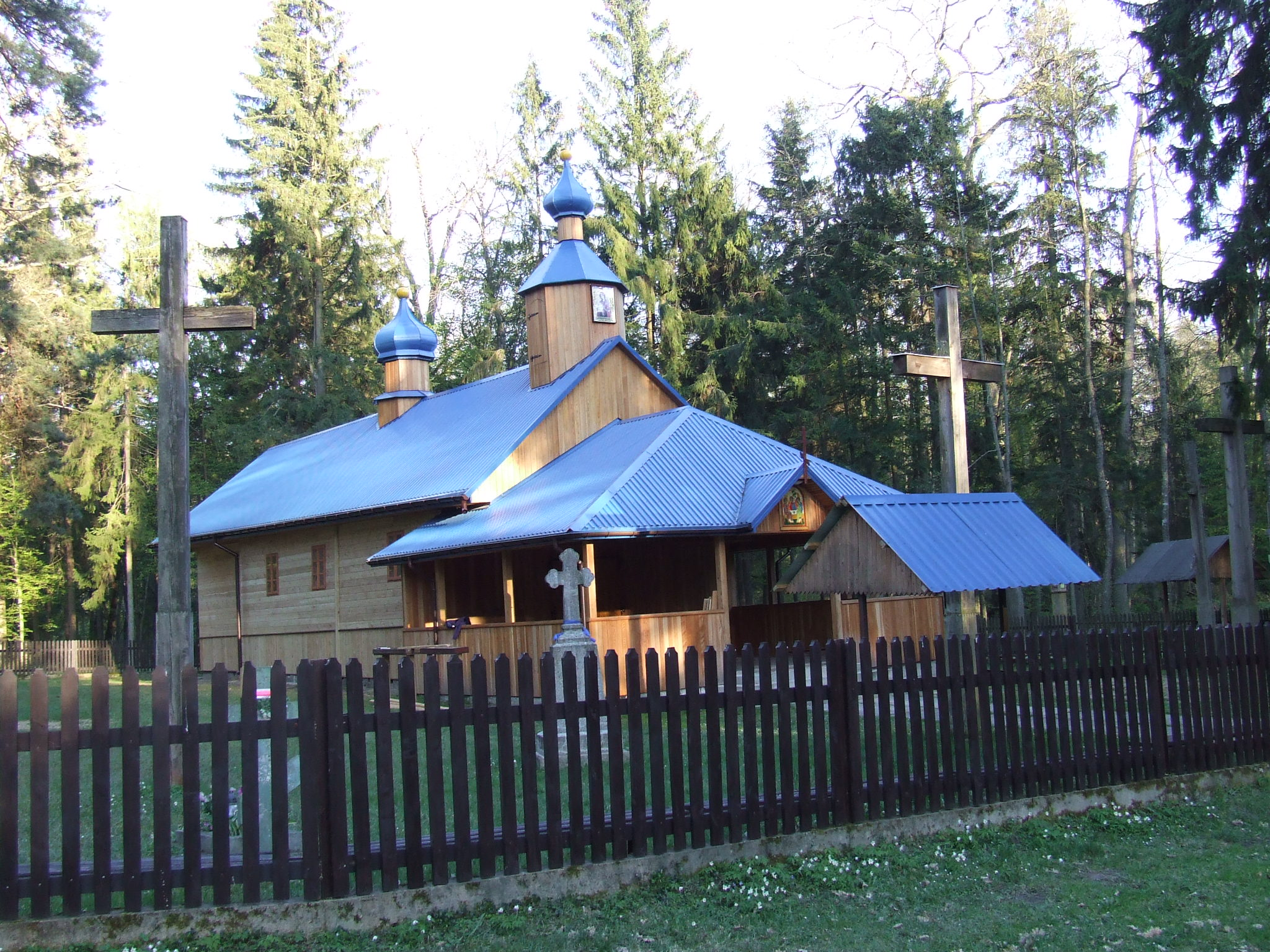 Krynoczka (Hajnowka) – holly place for greek church in Poland; Krynoczka (Hajnówka) – święte miejsce dla kościoła prawosławnego w Polsce.